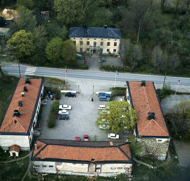 Fittja gård från söder.